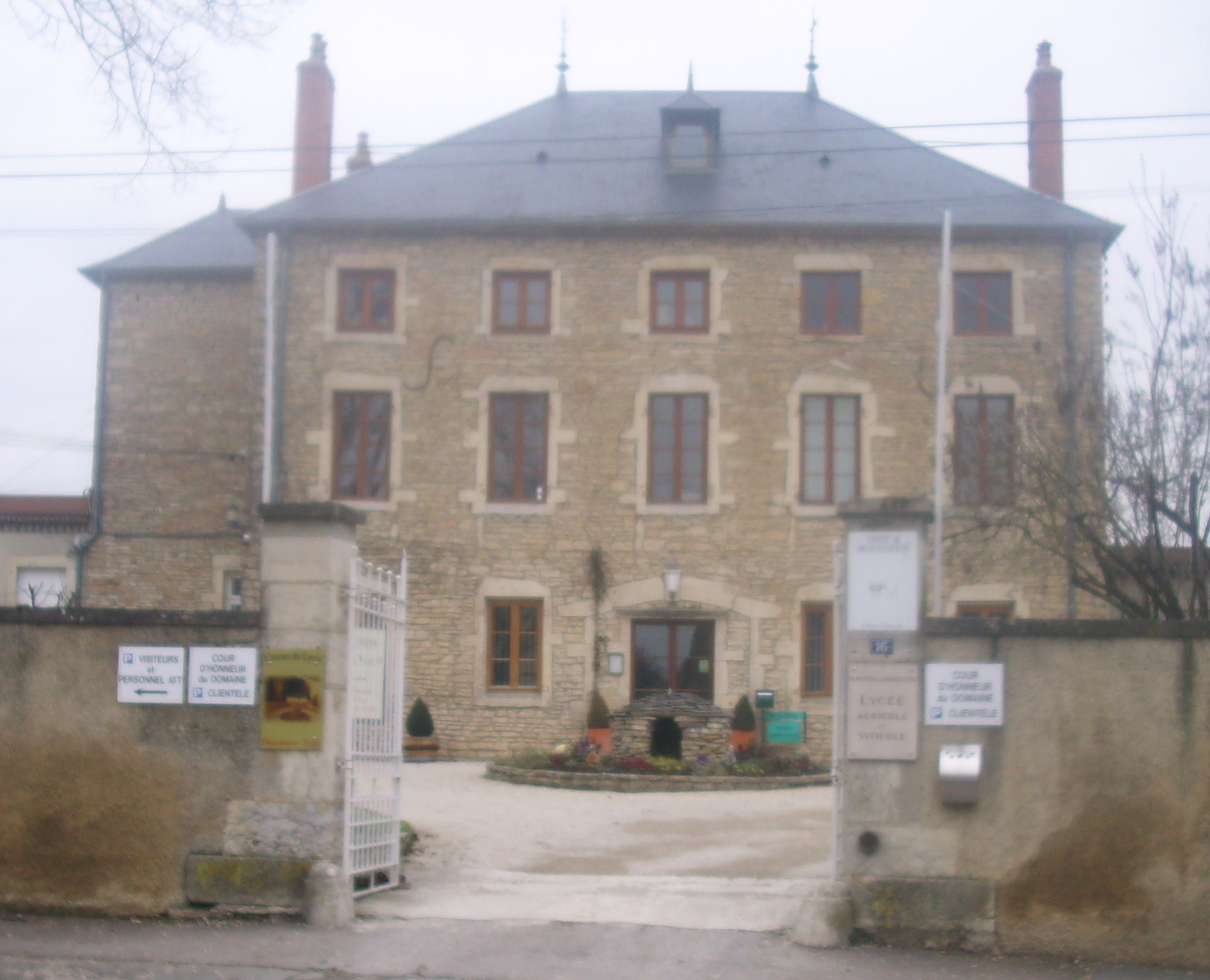 Vur d'un batiment du lycée viticole de Bourgogne (21)